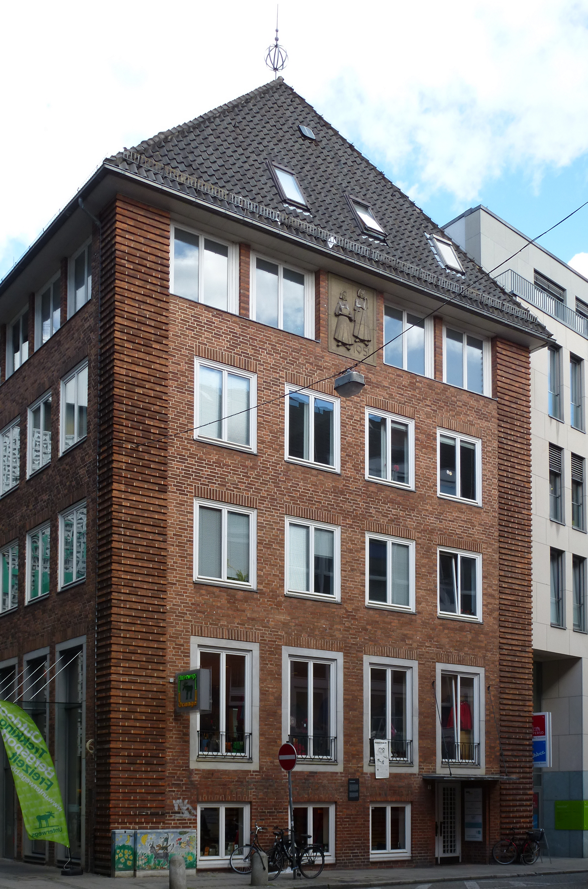 Frauen-Erwerbs- und Ausbildungsverein in Bremen, Carl-Ronning-Straße 2Das abgebildete Objekt ist ein geschütztes Kulturdenkmal in der Freien Hansestadt Bremen, mit der Nr. 0258 beim Landesamt für Denkmalpflege registriert.